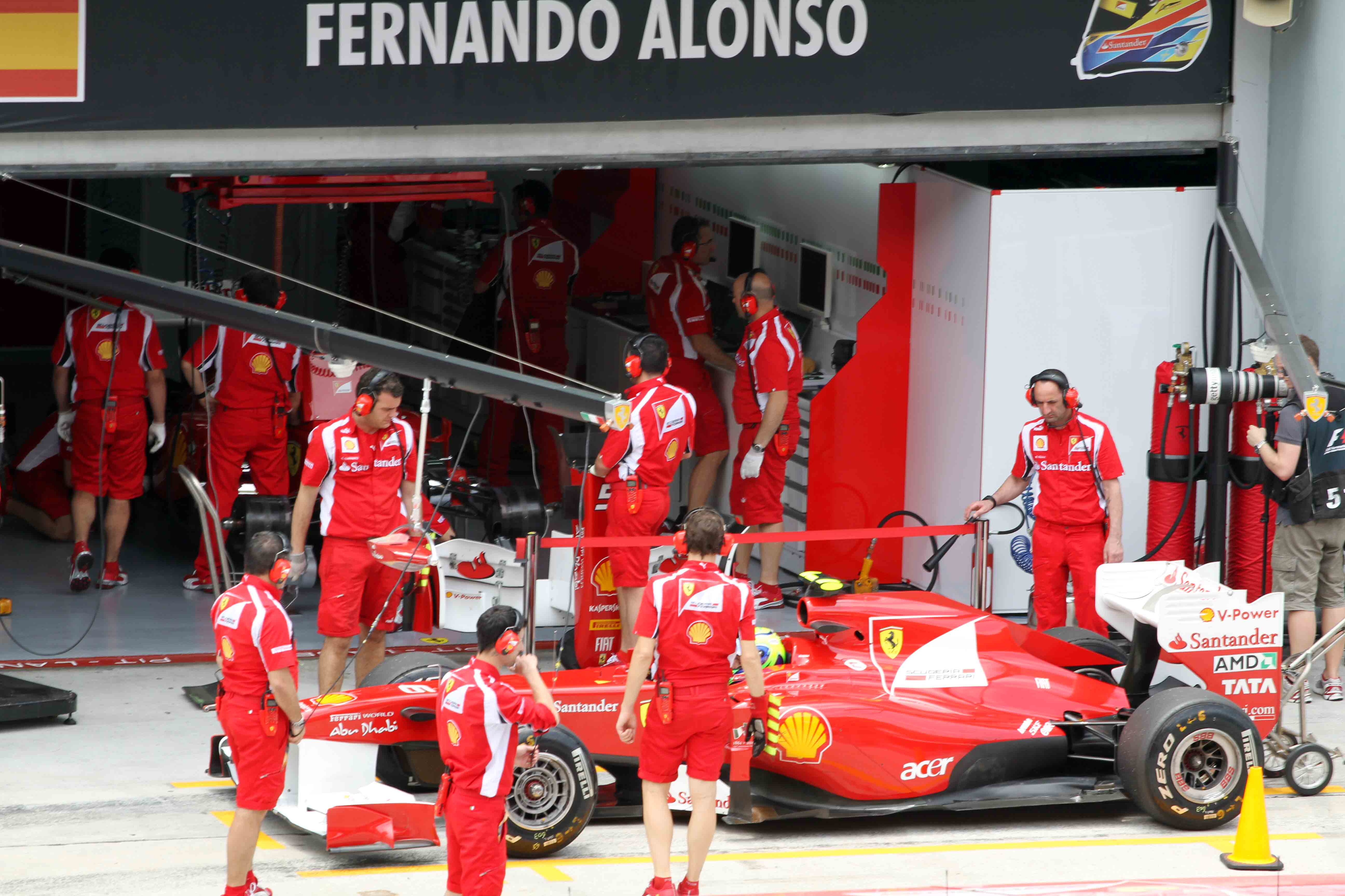 Malaysia F1 GP 2011